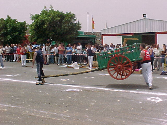 Carreta vasca en Fuerteventura